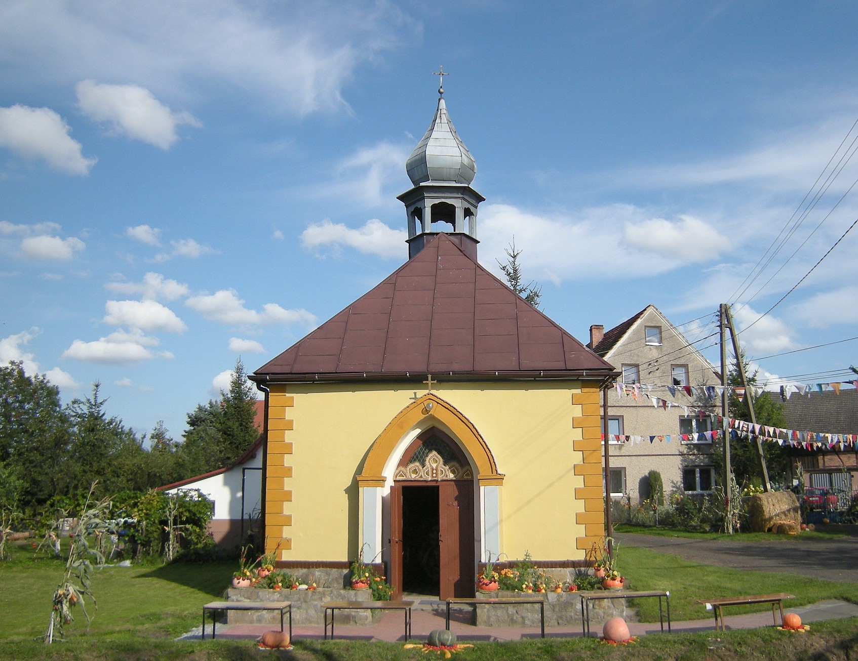 Kaplica w Broniszowicach w Gminie Otmuchów